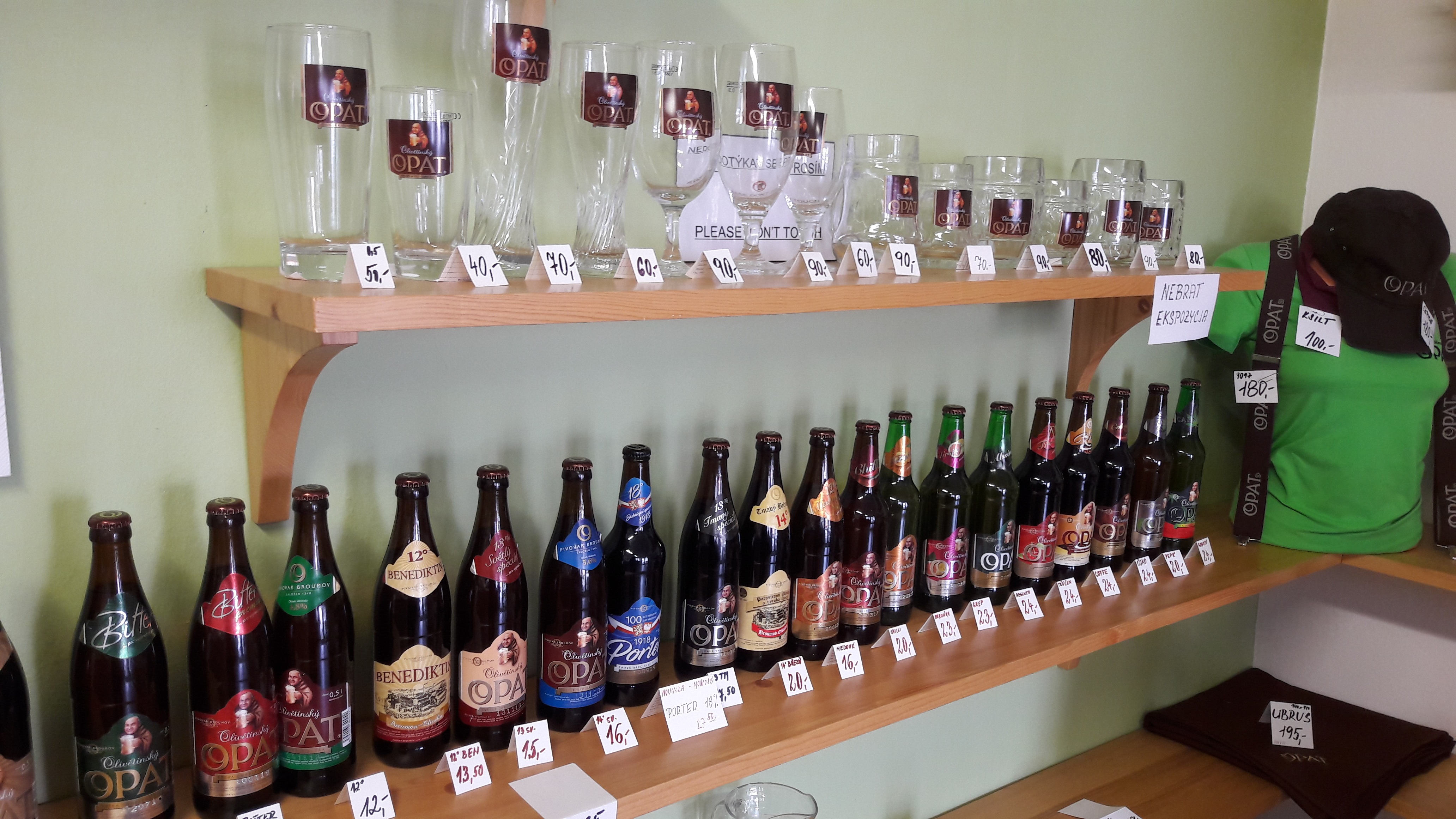 Pivovar Broumov sortiment vyráběných piv